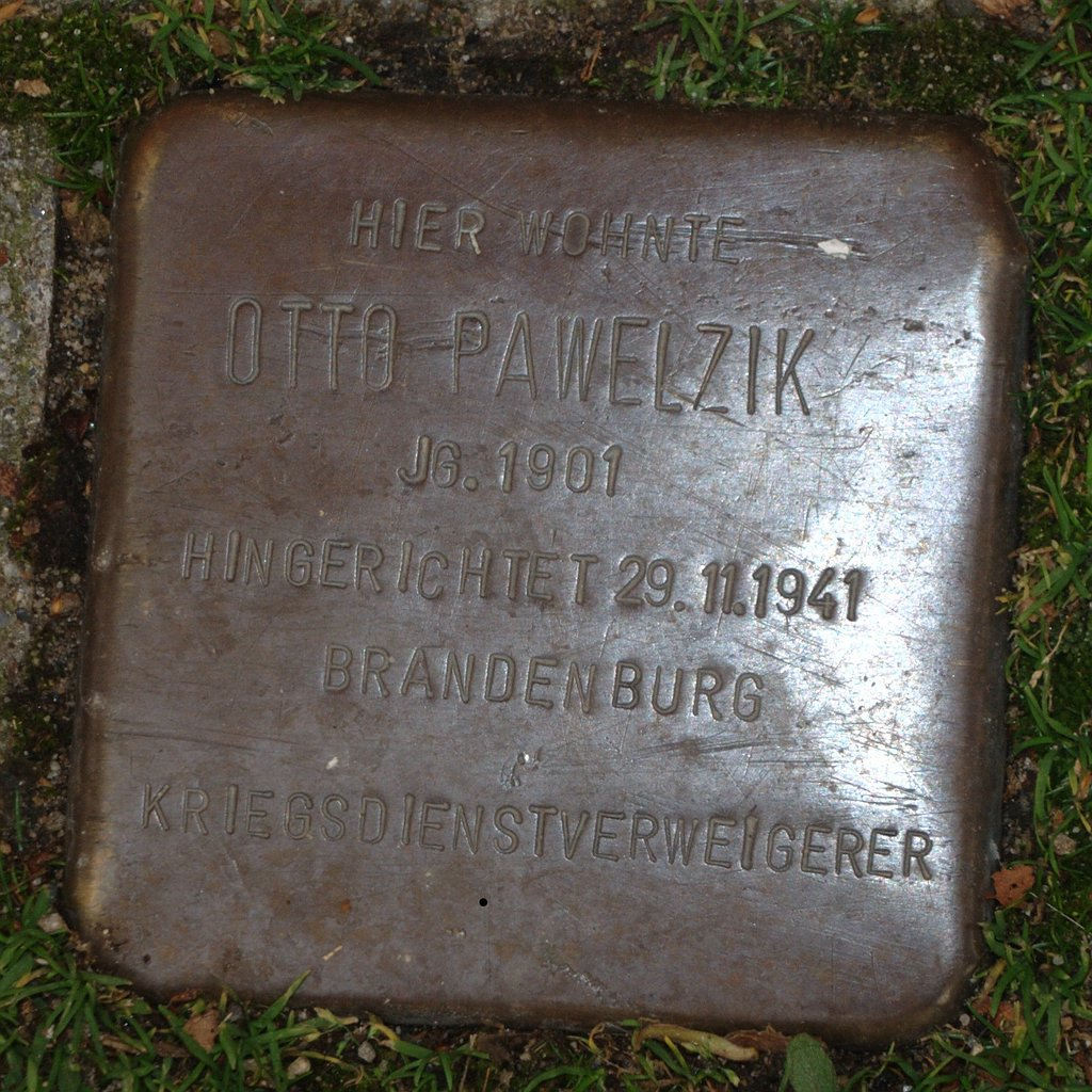 Stolperstein in Hattingen Otto Pawelzik